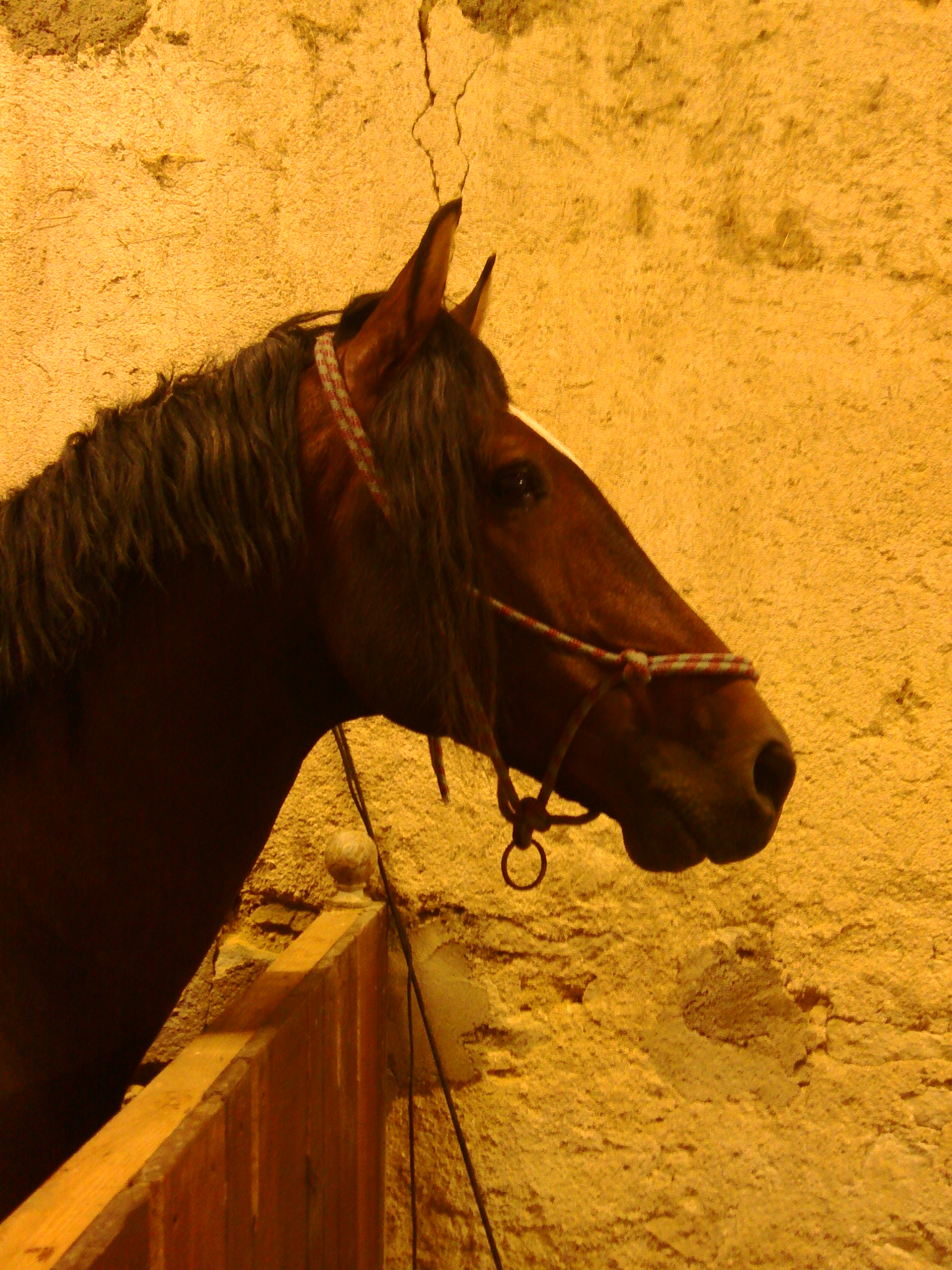 Cheval entier lusitanien bai portant un licol éthologique (licol américain), en France.